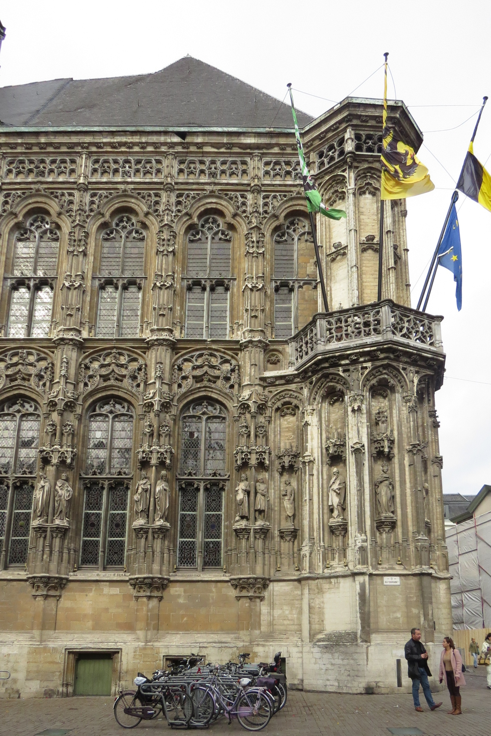 Stadt Gent, Rathaus, ältestes Bauteil